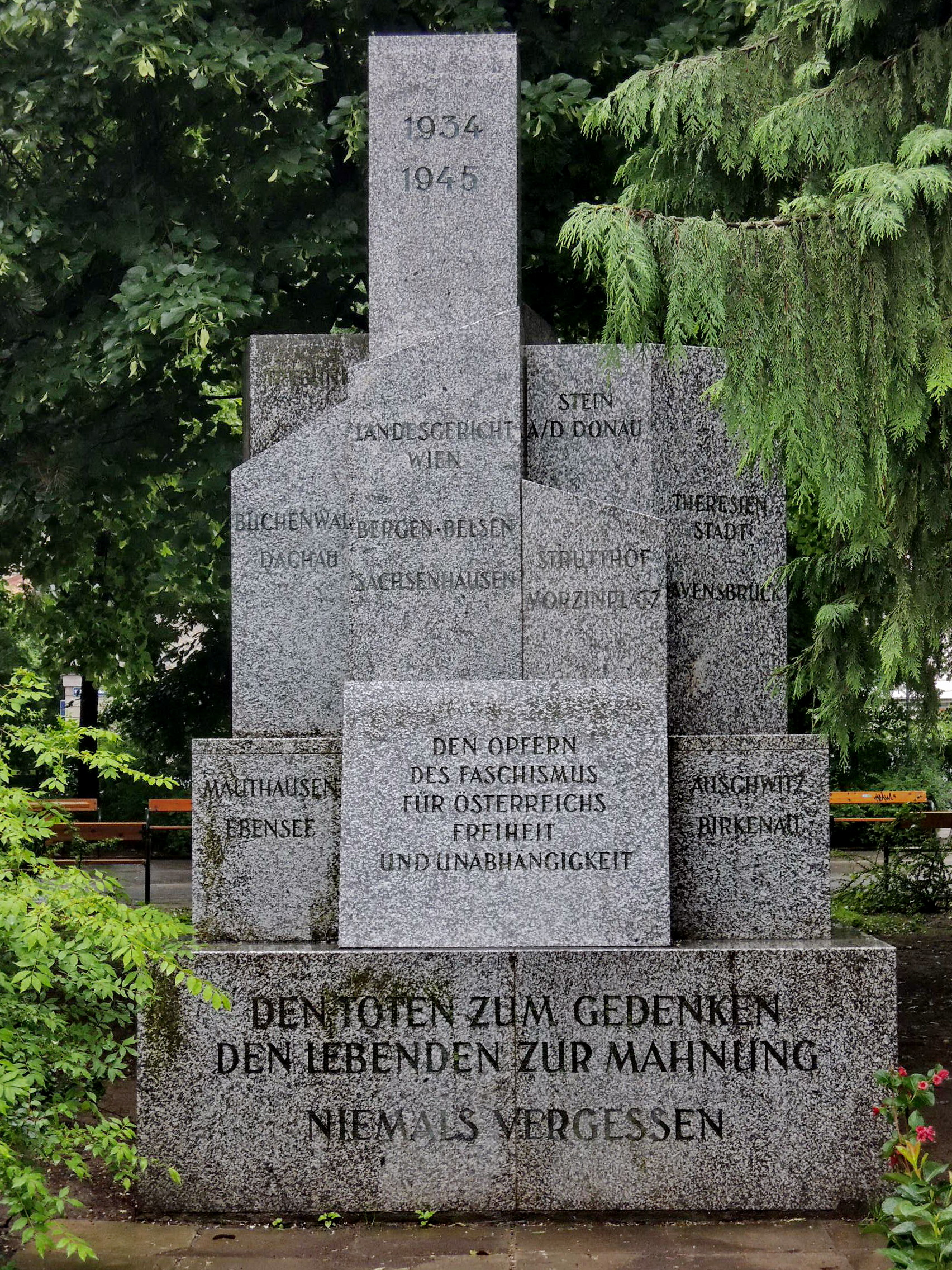 Mahnmal für Opfer des Faschismus (1981) von Heinrich Sussmann, Reumannplatz, Wien-Favoriten